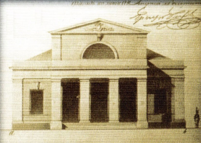 Беларуская (тарашкевіца): Гомель (Homiel). Ратуша